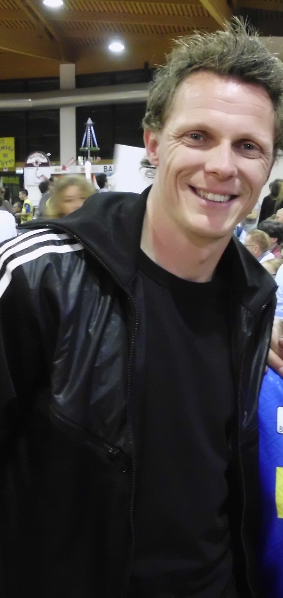 frey 21